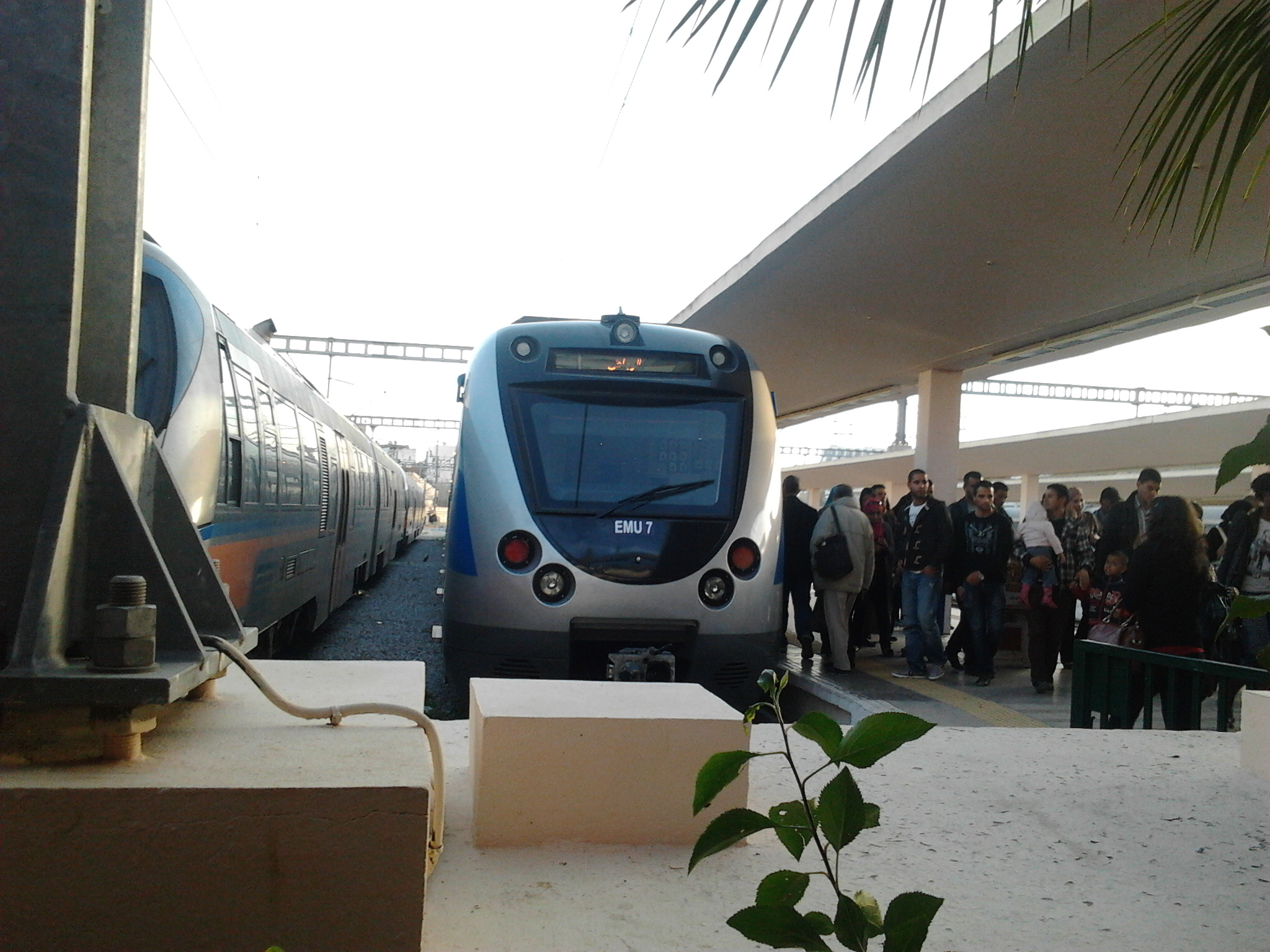 The new suburban train (electric train)